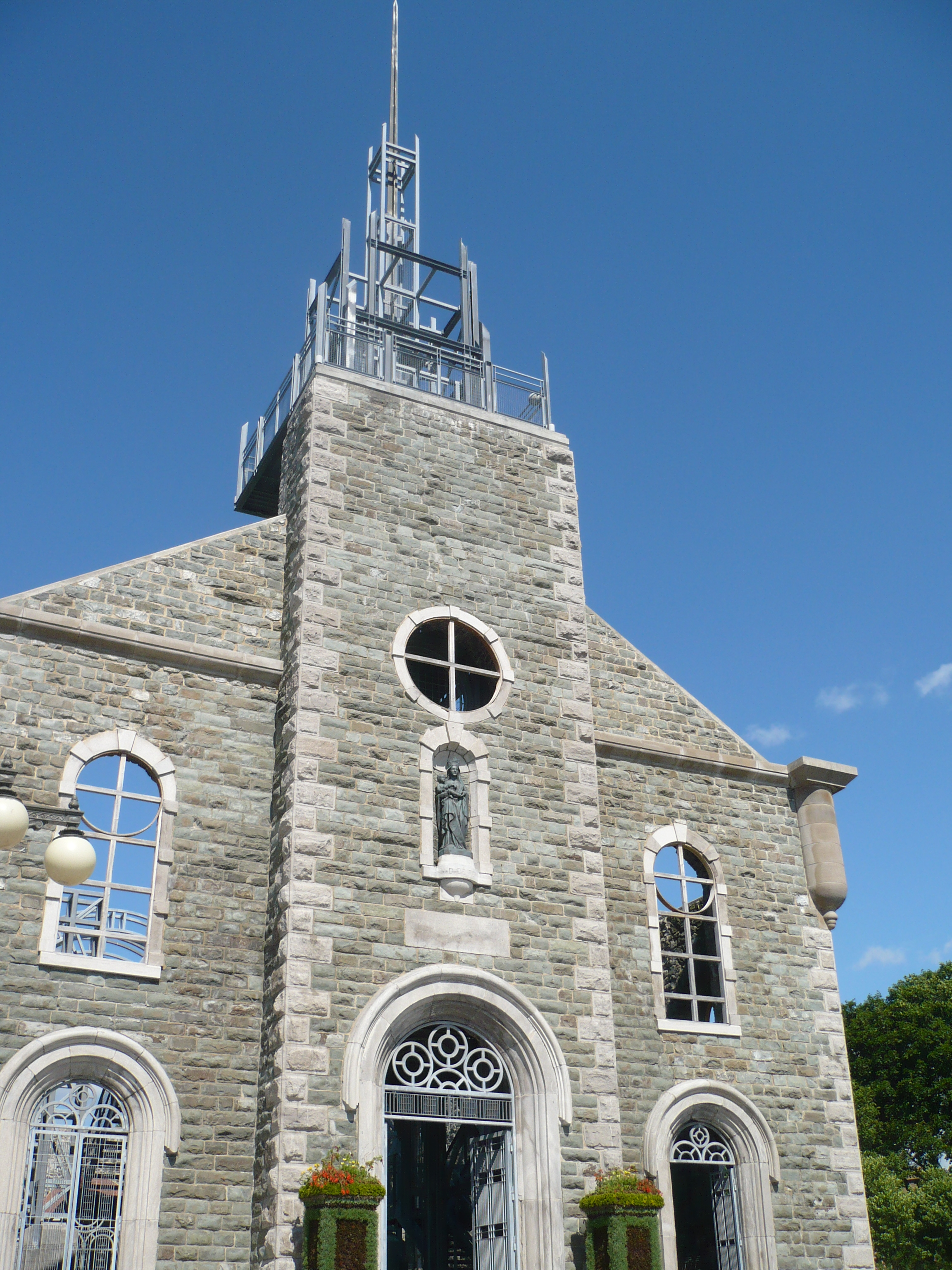 Facade de l'«église brûlée» dans le Parc de la Visitation.